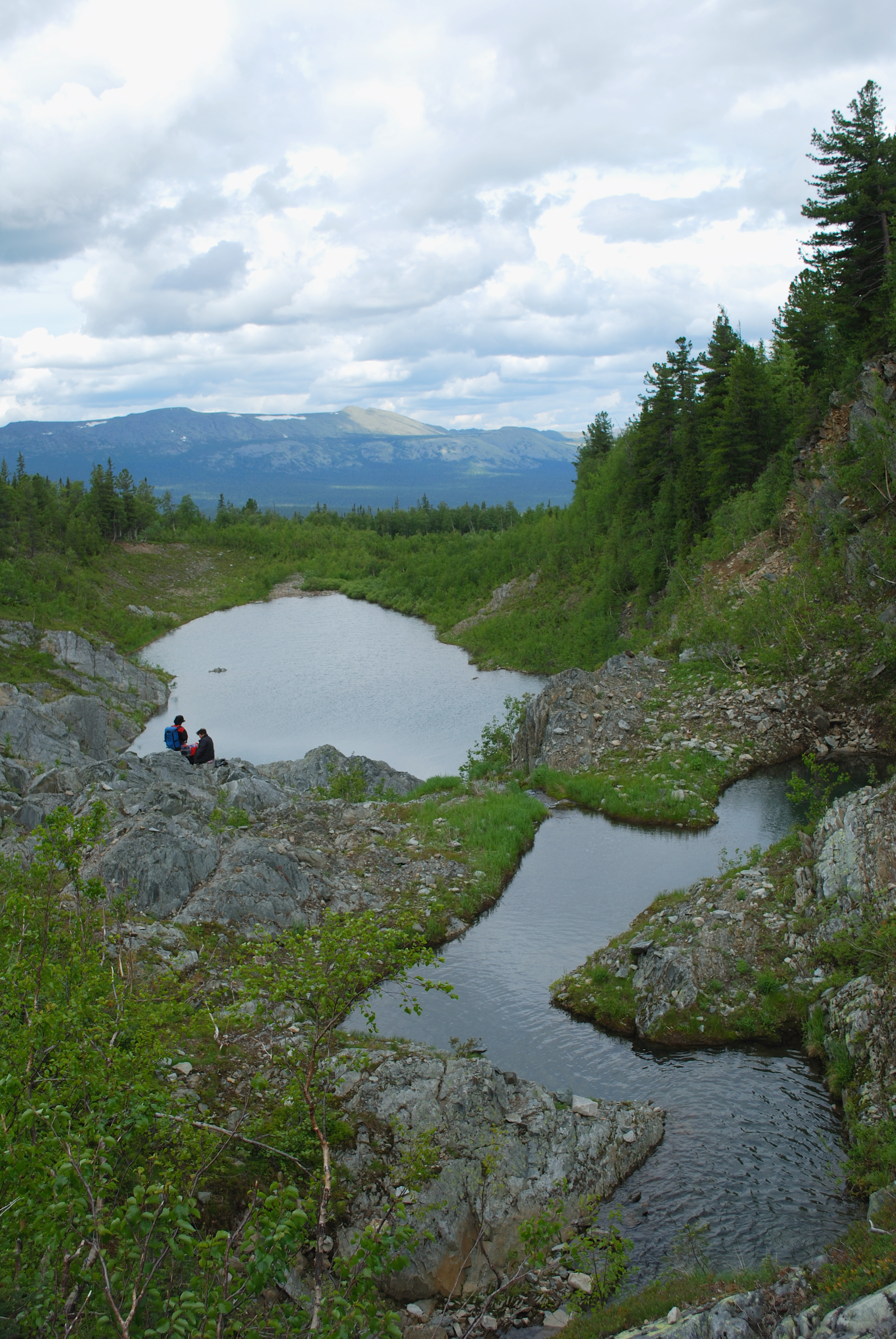 Вишерский заповедник, Красновишерский район This image is related to the protected area of Russia number 5900186